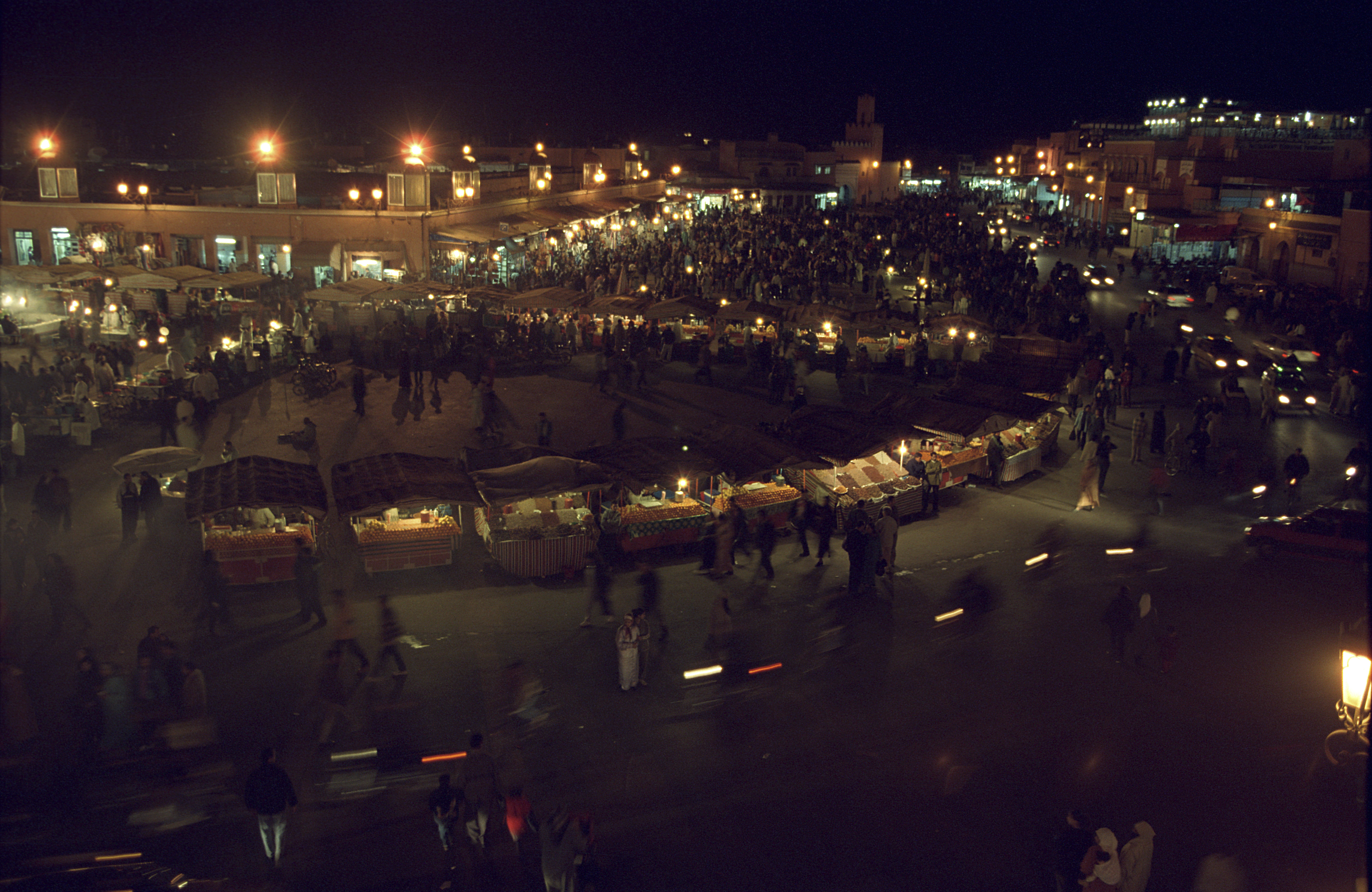 Marrakesh, Djemaa el Fna